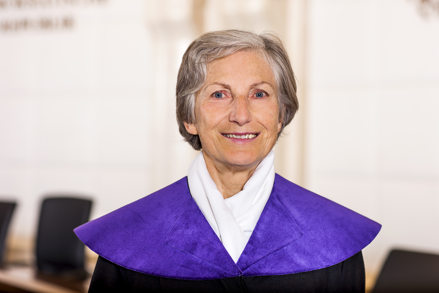 Dr. Irmgard Griss, Ersatzmitglied des österreichischen Verfassungsgerichtshofs ab 2008.